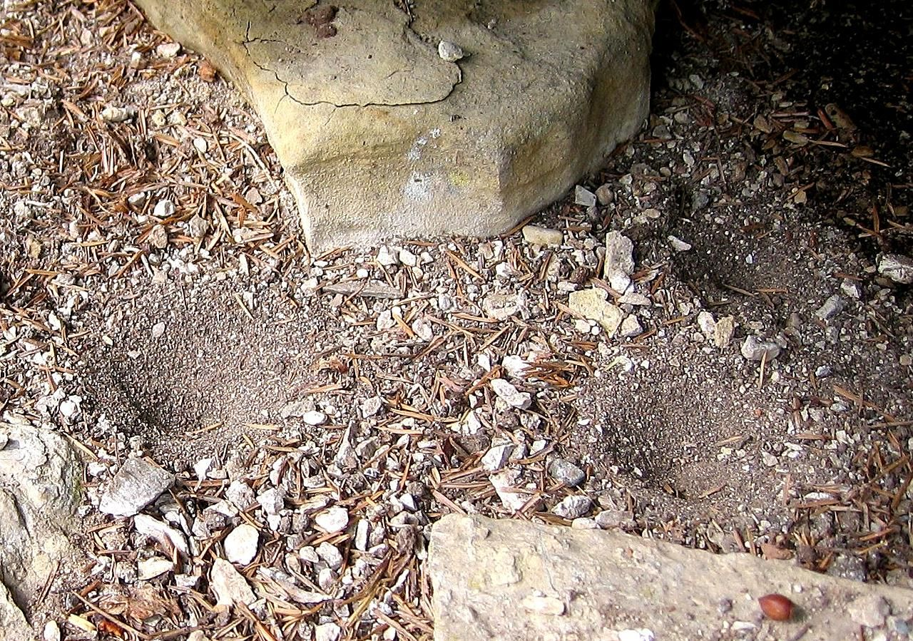 Antlion traps Location: Saarland Keywords: Myrmeleontidae --- nl: Valkuilen van (één of andere soort) mierenleeuw de: Trichter eines Ameisenjungferns